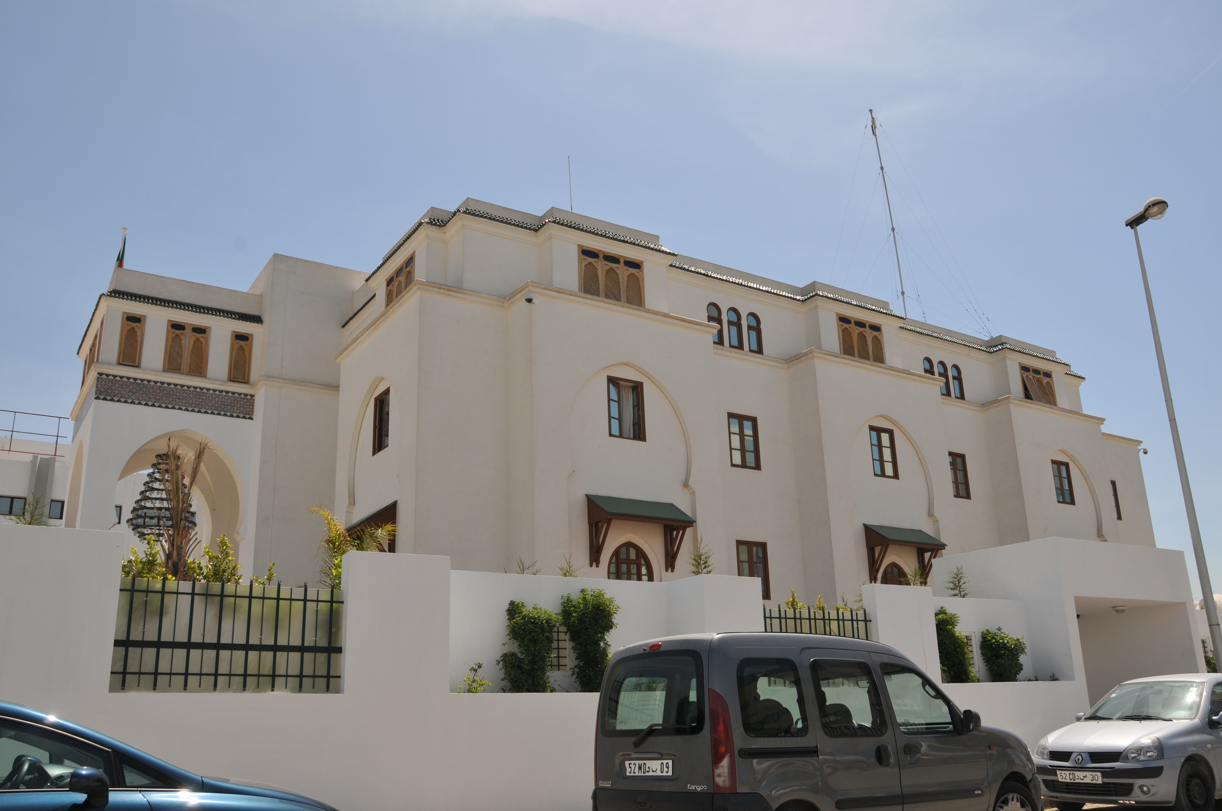 Ambassade d'Algérie à Tunis (Tunisie)